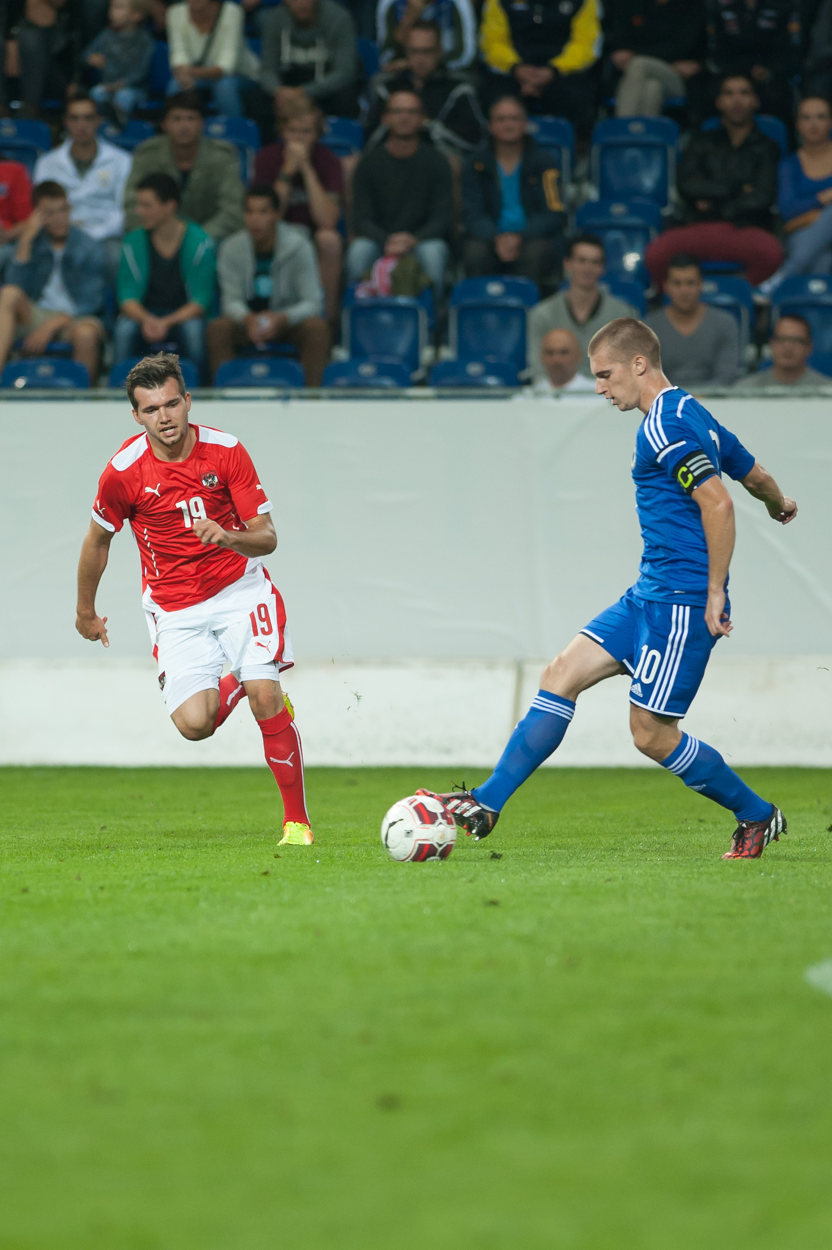 Fußball U21 EM-Qualifikation Österreich gegen Bosnien und Herzegowina St. Pölten, 5. September 2014 - Kevin Stöger, Srđan Grahovac